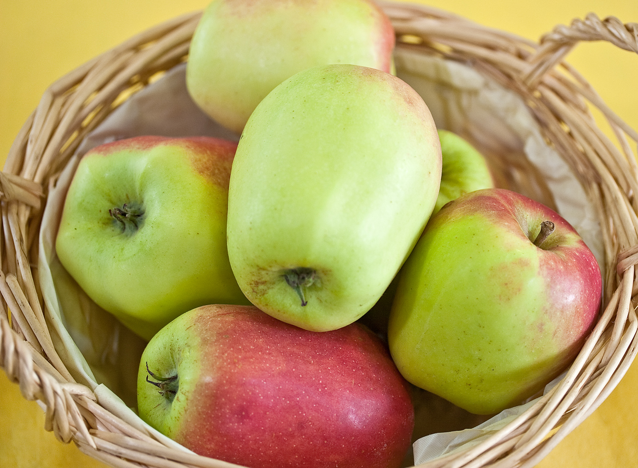 Der Glockenapfel ist eine Apfelsorte